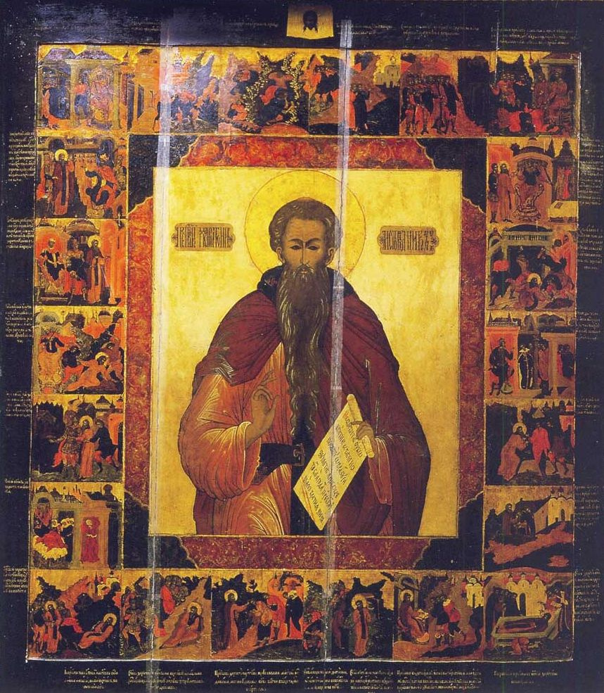 Преподобный Харитон Исповедник, с житием в 22 клеймах